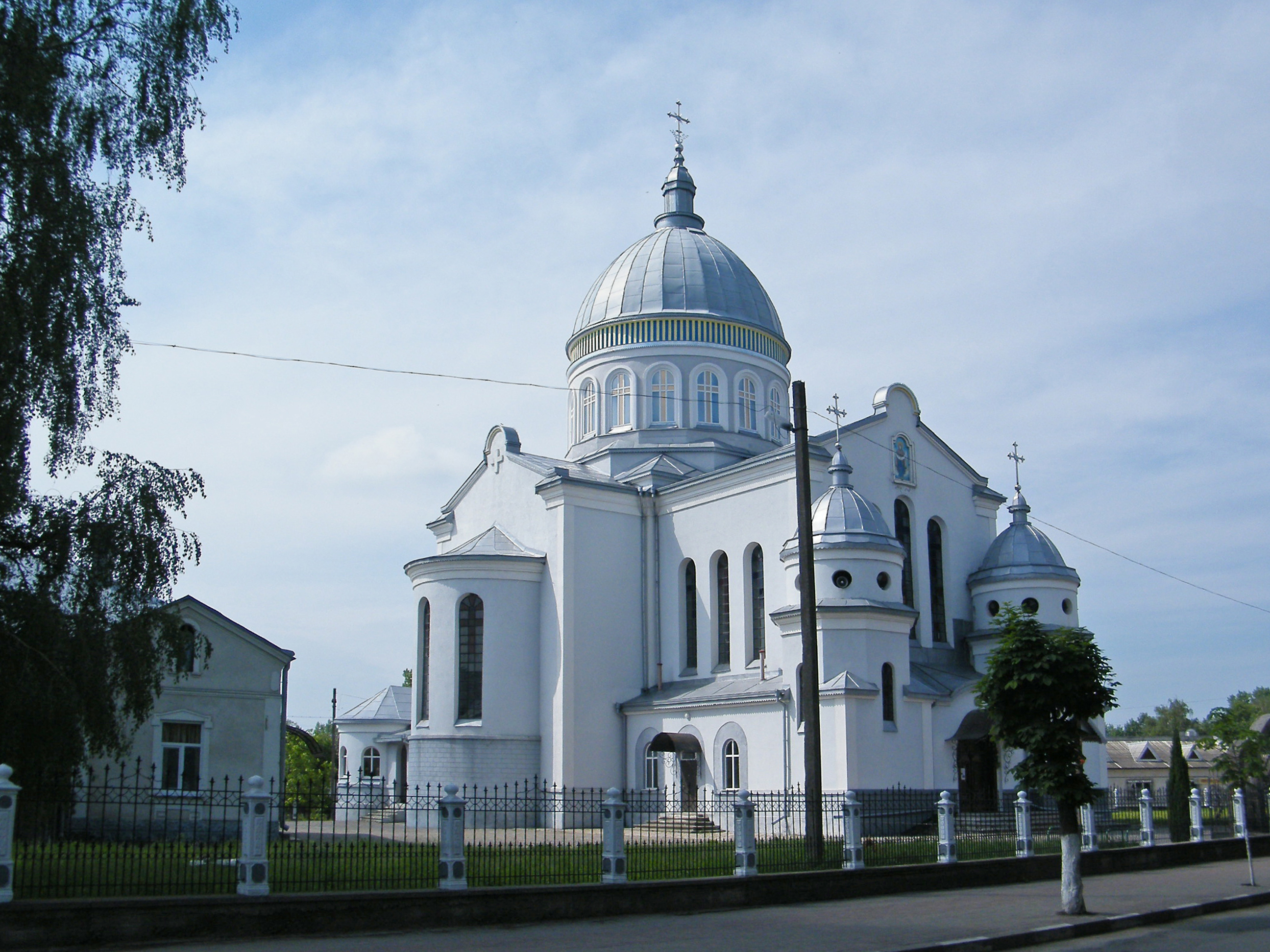 Храм Святого Михаила